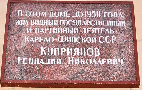 Мемориальная доска в Петрозаводске. Установлена 21 ноября 2005 года на доме № 39 по улице Дзержинского. В 2007 году мемориальная доска демонтирована по решению прокуратуры.